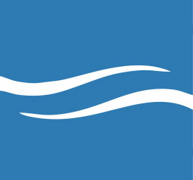 Логотип Furat Media